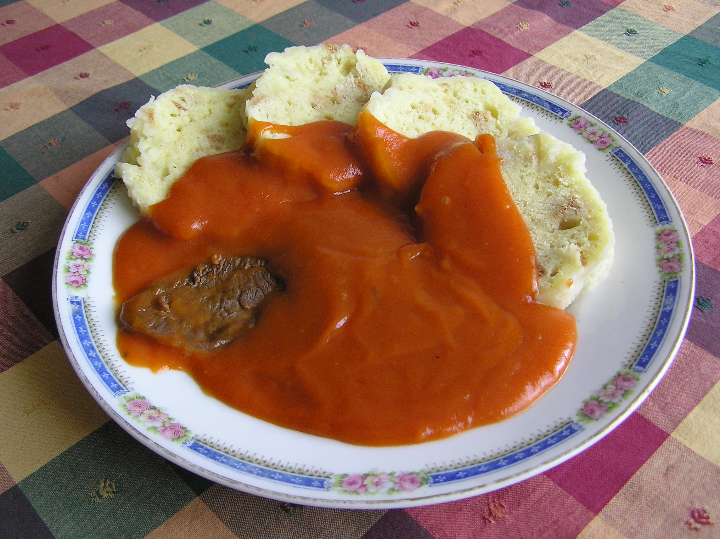 Rajská omáčka, hovězí maso, houskový knedlík.